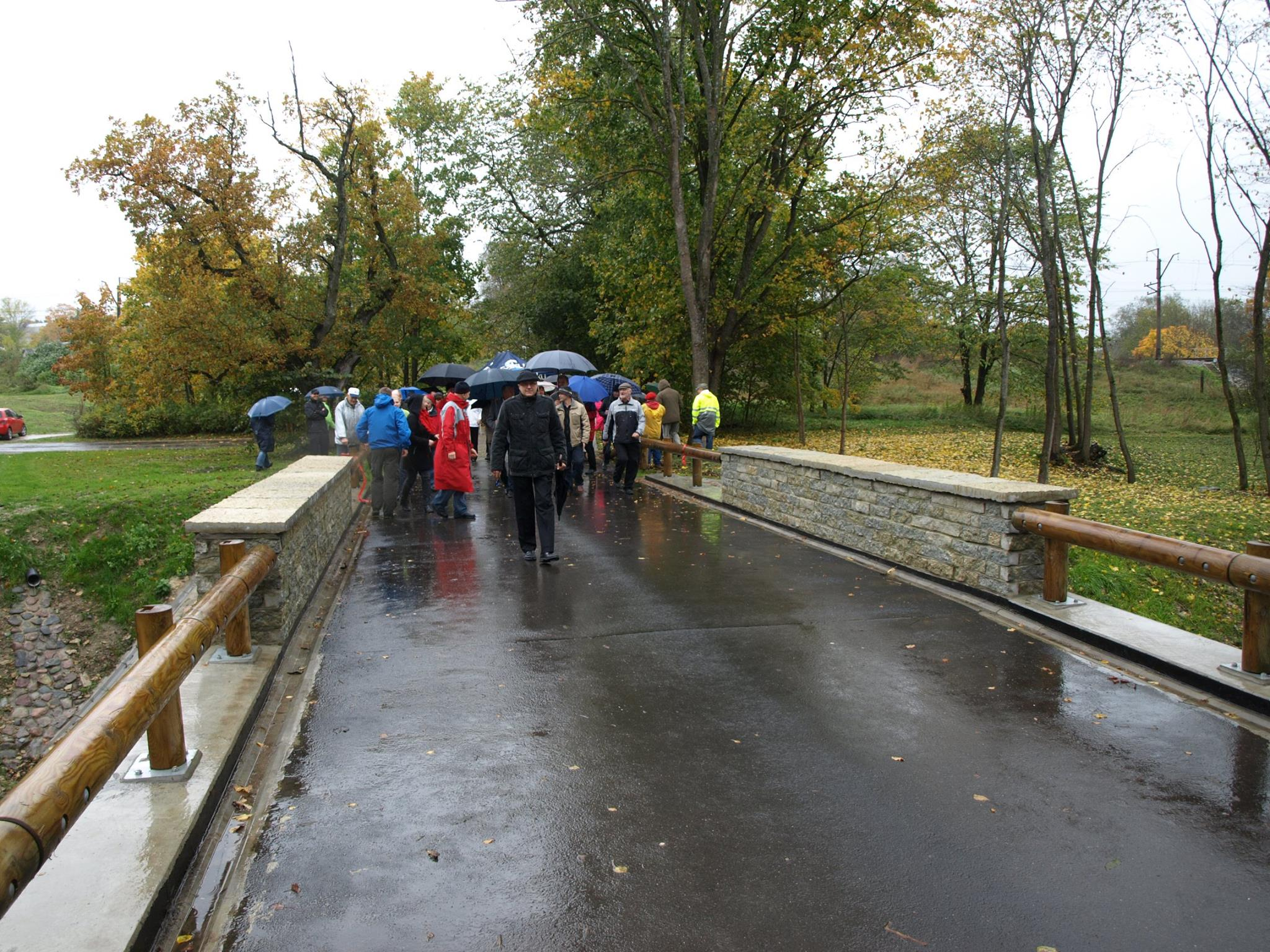 Keila Jõesaare jalakäijate silla avamine. Sild lasti ametlikult ja pidulikult käiku 5. oktoobril 2012 koos vana jõeharu taastamisega, mispeale Keila sai taas Jõesaare, mis on saar.